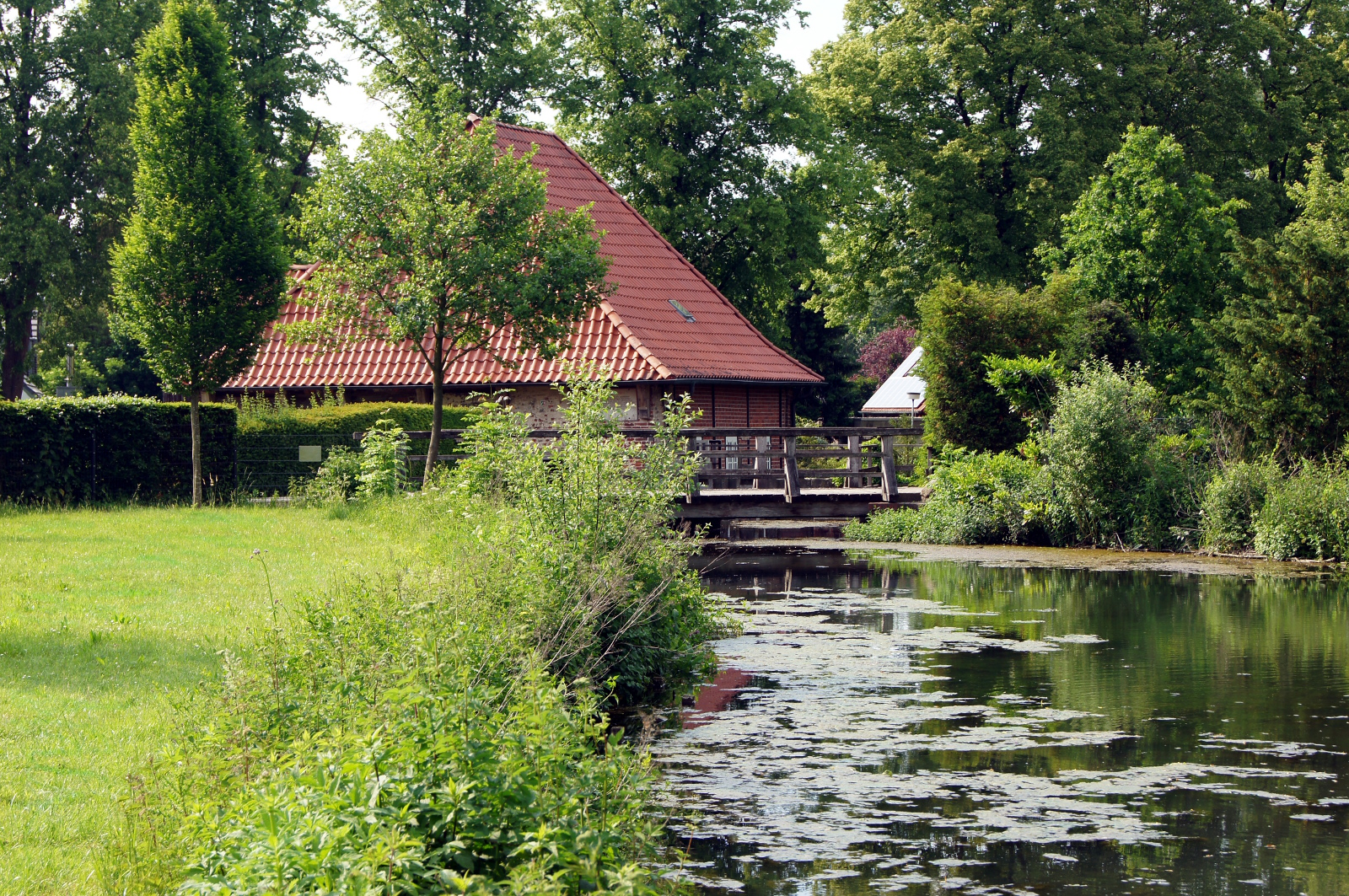 Die Bischofsmühle in Coesfeld mit dem angestauten Honigbach.